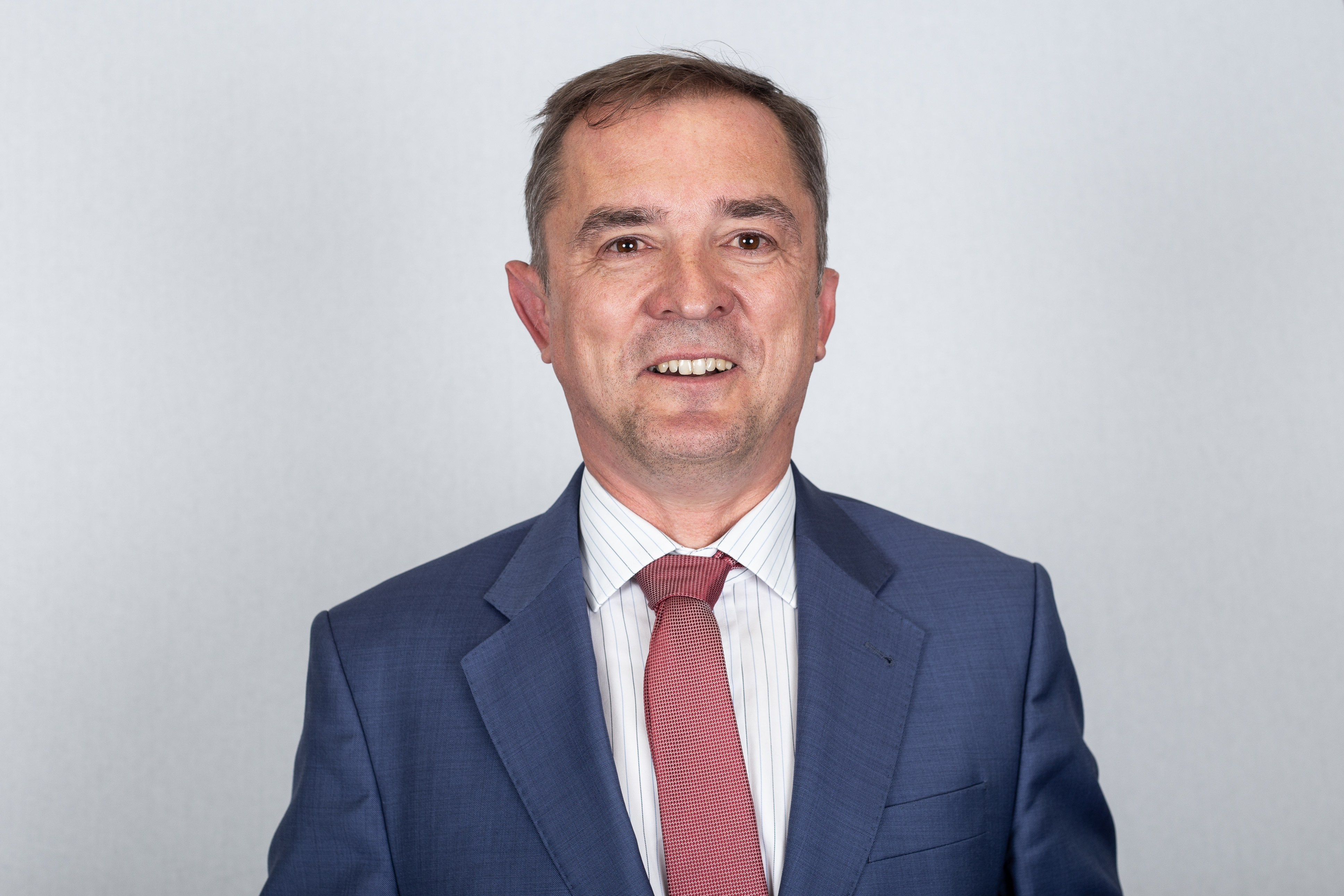 Marco Tullner, MdL Sachsen-Anhalt, CDU